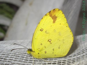 Eurema floricola ceres